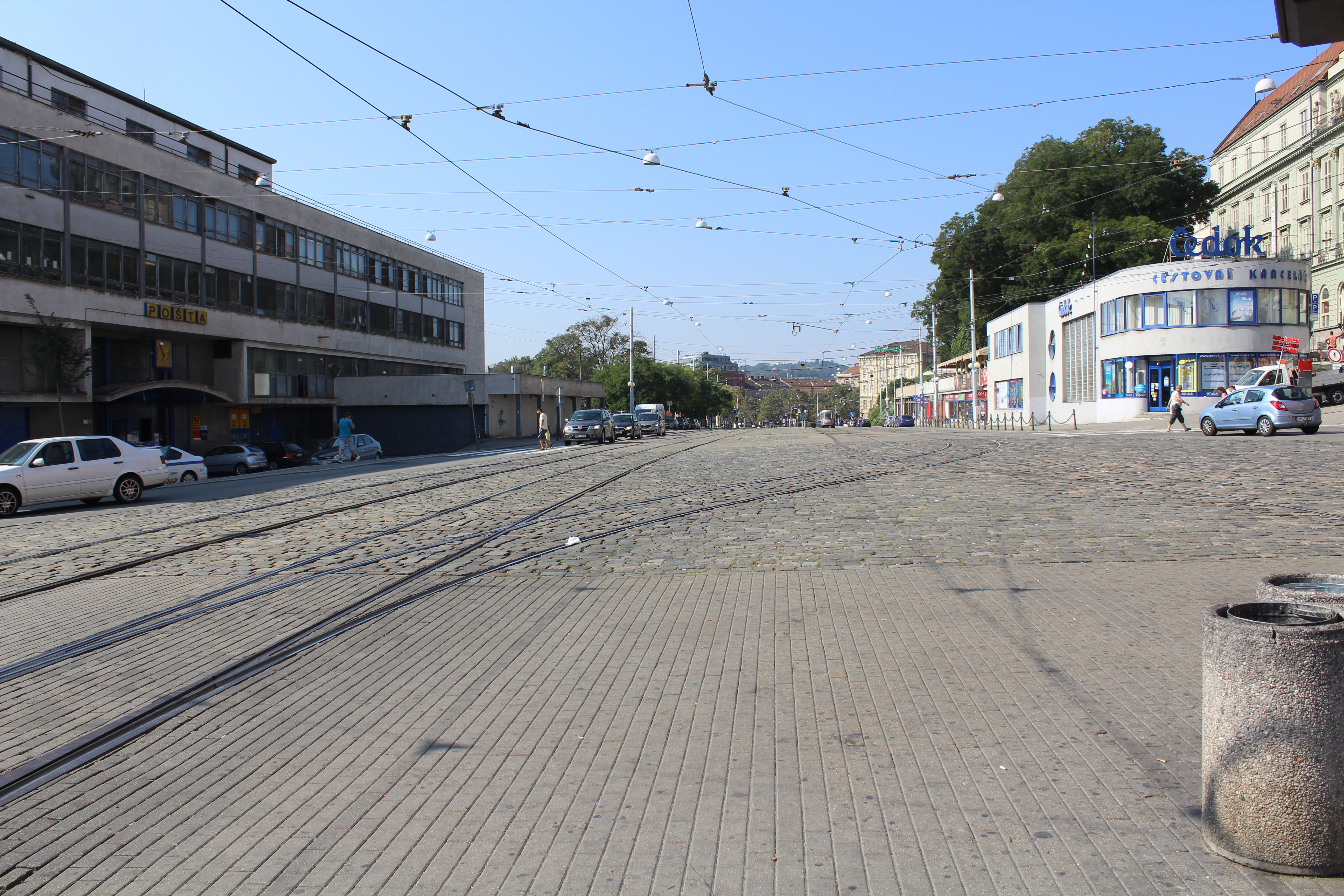 Prostor před nádražím, nádražní třída východní část